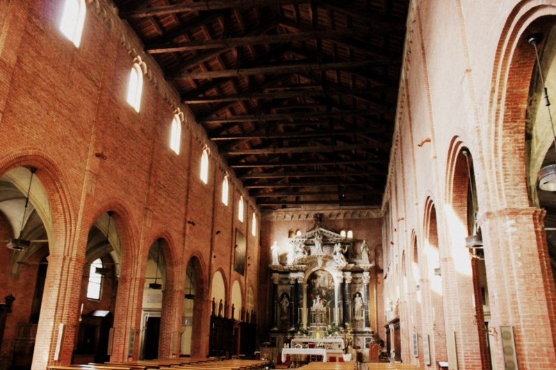 Interno di San Benedetto Vecchio a Padova